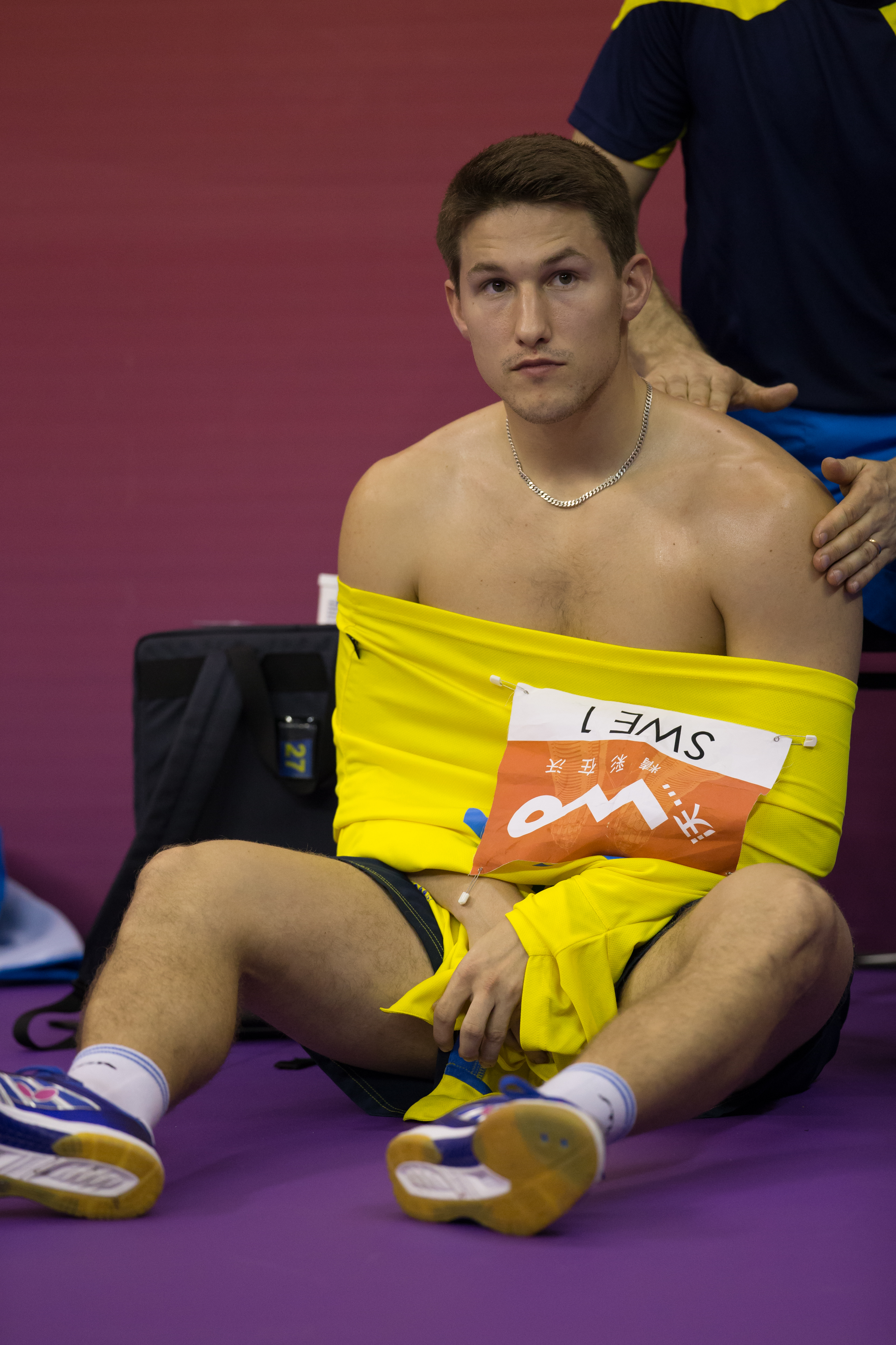 _K0K3664